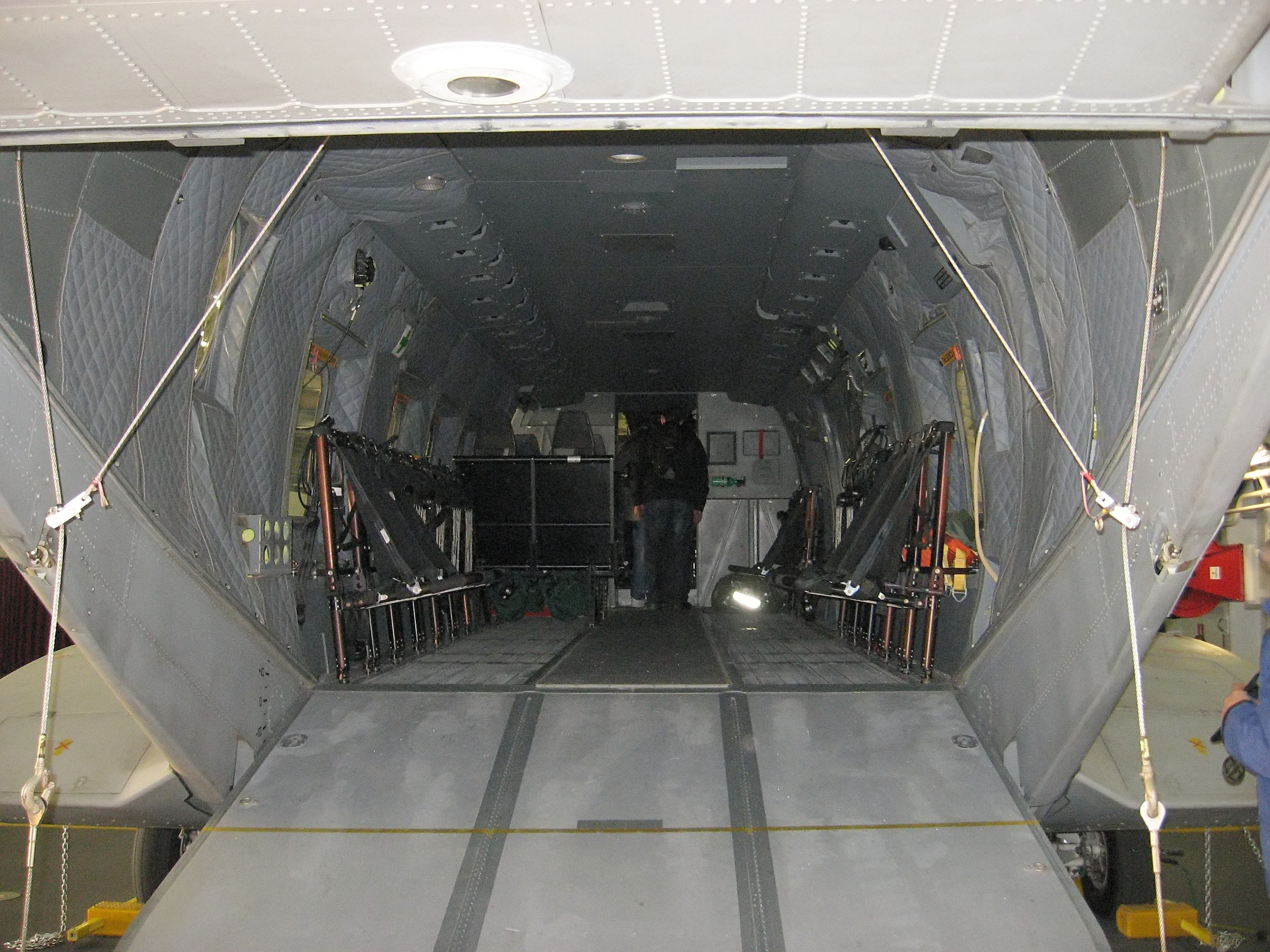 L'interno di un elicottero EH 101 appartenente al gruppo imbarcato della portaerei Cavour.